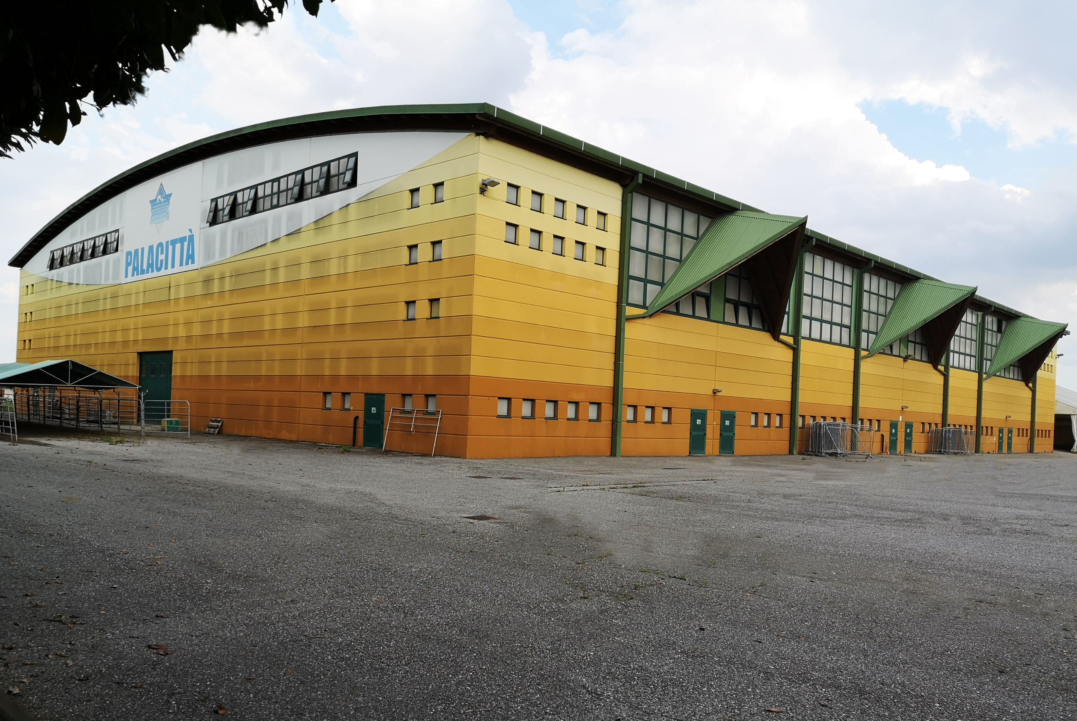 Palacittà di Travagliato